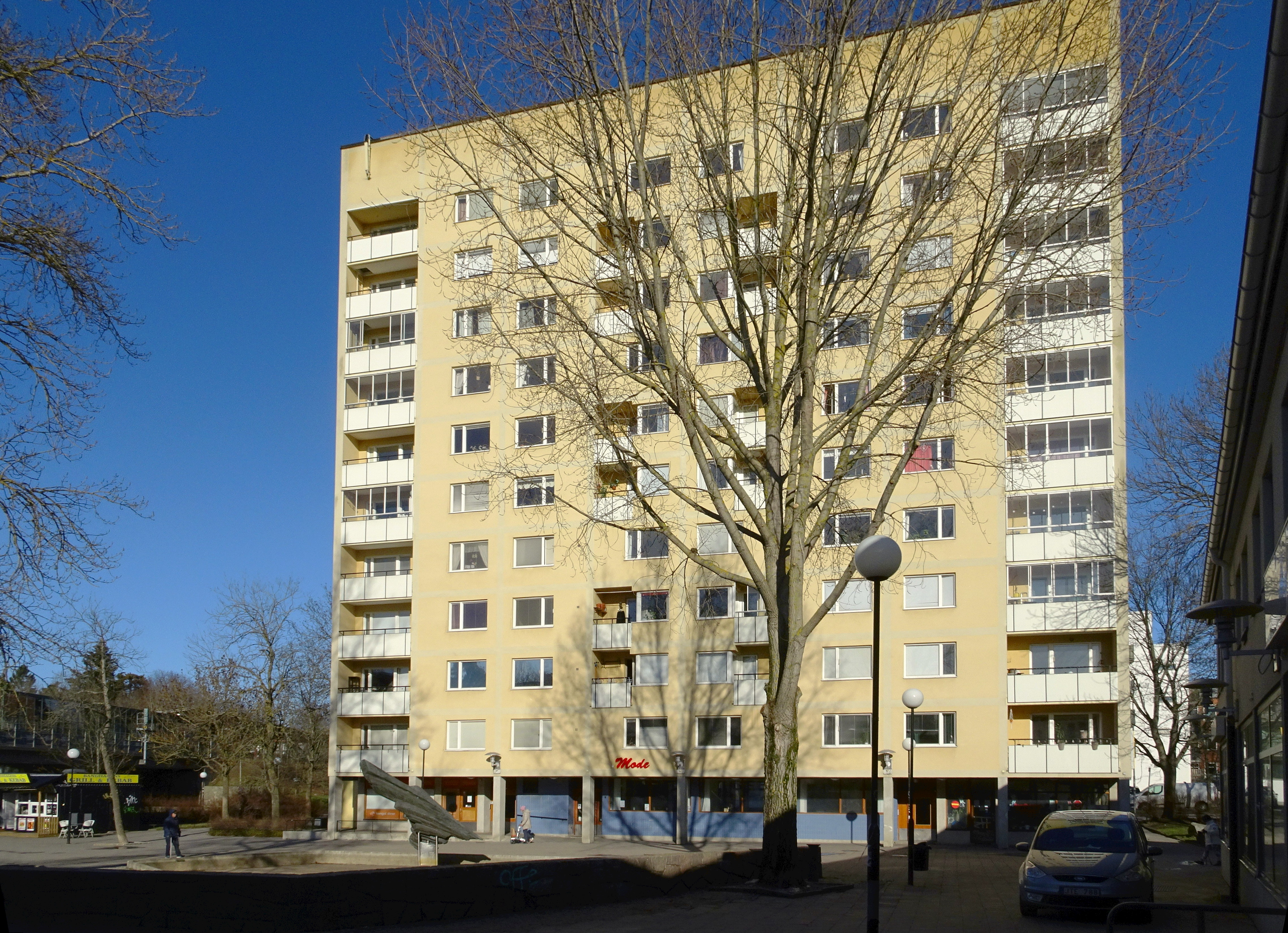 Bandhagen, kvarteret Murbruket, höghus i Bandhagens centrum. AB Skånska Cementgjuteriet (Byggmästare) Carl Johan Bylund (Byggmästare) Fred Forbat (Arkitekt) Gertrud Kull (Arkitekt) Harry Egler (Arkitekt) HSB:s Riksförbund, Arkitektkontoret (Arkitektkontor) HSB Stadsplaneavdelningen (Arkitektkontor) Hyresgästföreningens i Stockholm Brf Bandhagen (Byggherre) Nybyggnadsår 1954 - 1955